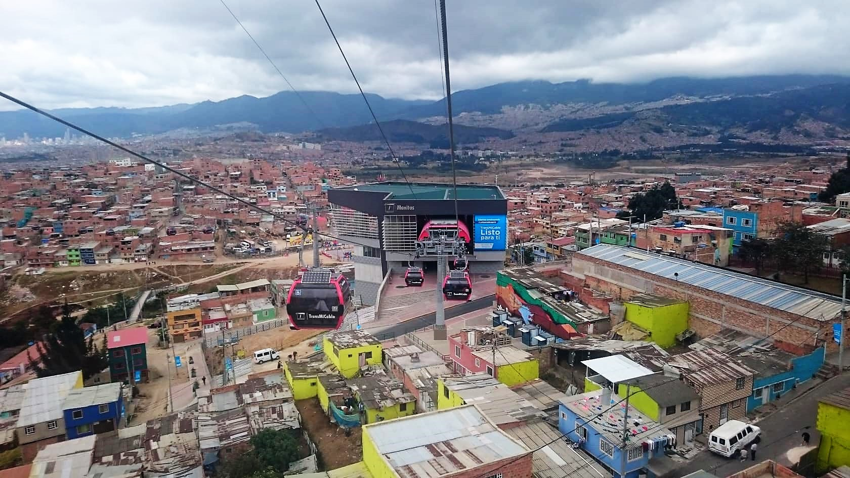 TransMiCable